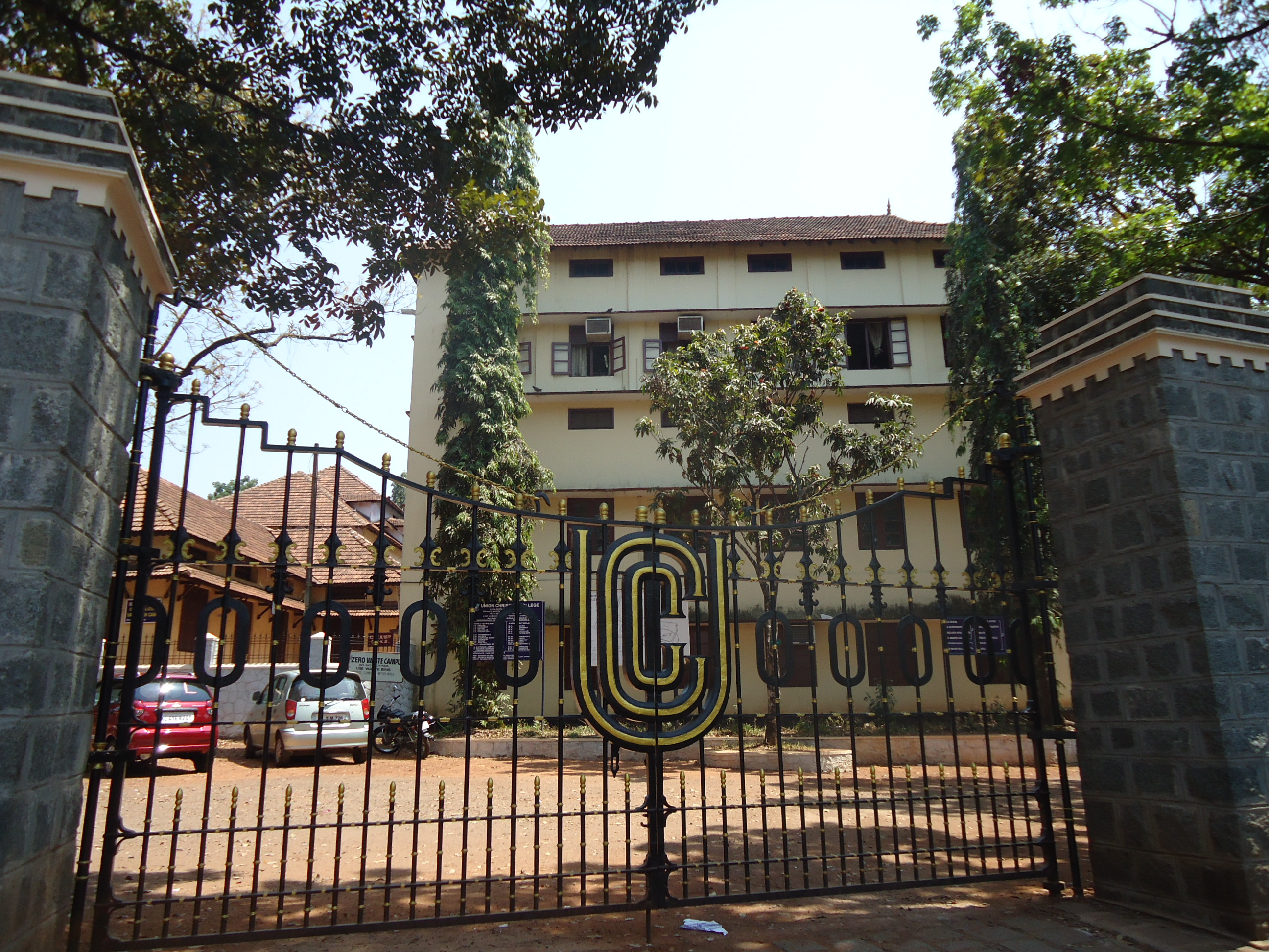 UC College Aluva